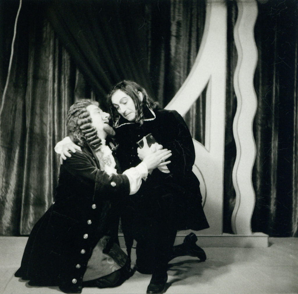 Jean Baptiste Poquelin Molière, Tartuffe, SNG za Svobodno tržaško ozemlje. Na fotografiji: Jožko Lukeš (Orgon), Rado Nakrst (Tartuffe)